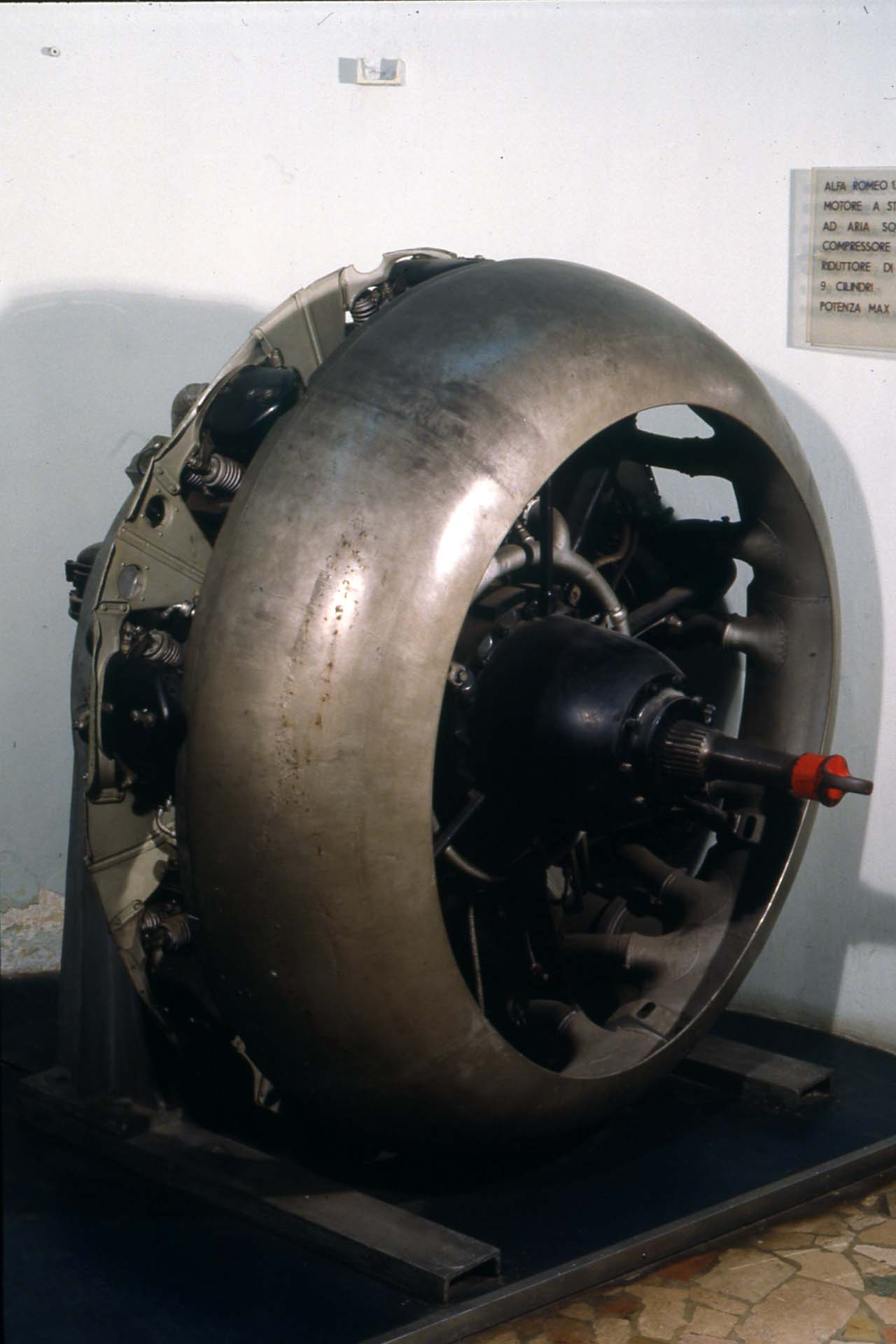 Motore a 9 cilindri disposti a stella, raffreddato ad aria. La superficie esterna dei cilindri presenta un'ampia alettatura. La distribuzione è regolata per mezzo di quattro valvole in testa ad ogni cilindro, comandate per mezzo di aste e bilancieri. Il sistema di alimentazione comprende un carburatore e un compressore centrifugo a due velocità, posto a valle del carburatore. Ogni cilindro dispone di due candele di accensione, alimentate da due magneti. Il motore presenta un condotto di scarico a forma d'anello, con profilo alare aerodinamico. Notizie storico-critiche A partire dal 1933, dopo la decisione dell'Aeronautica Militare italiana di concentrasi unicamente su propulsori raffreddati ad aria, le varie case costruttrici italiane produssero vari modelli di motori a stella raffreddati ad aria, derivati da licenze straniere. Nonostante venissero applicati molti sviluppi originali, i motori italiani durante gli anni '30 non apportarono particolari innovazioni al mondo dell'aviazione. Nel periodo successivo al 1934, l'Alfa Romeo produsse una serie di motore stellati raffreddati ad aria derivati dai propulsori inglesi Jupiter e Pegasus, progettati dalla Bristol Aeroplane Co. Il motore Alfa 131 fu l'ultimo di questa serie di motori derivati.